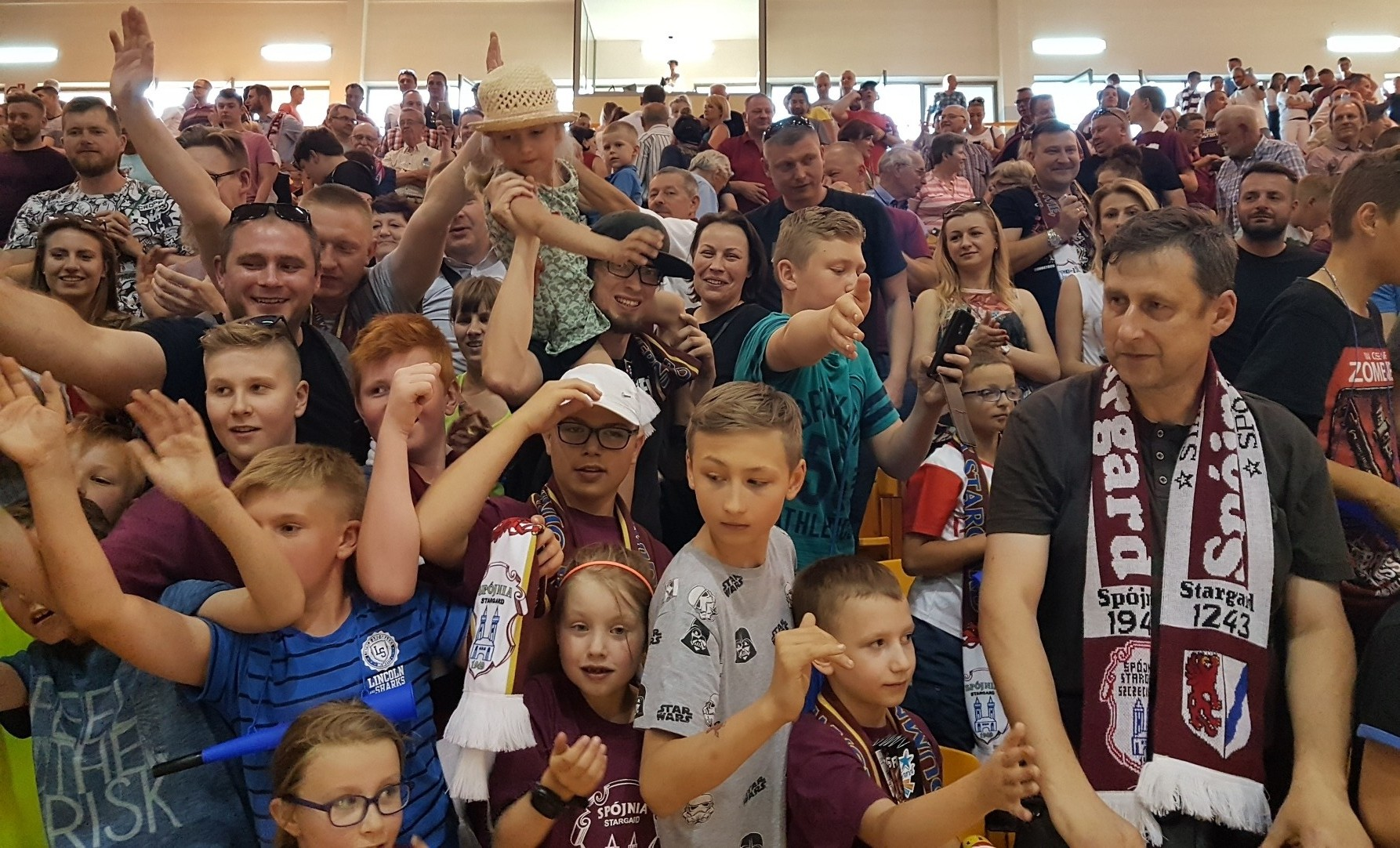 Finał, kibice stargardzcy (13.05.2018)